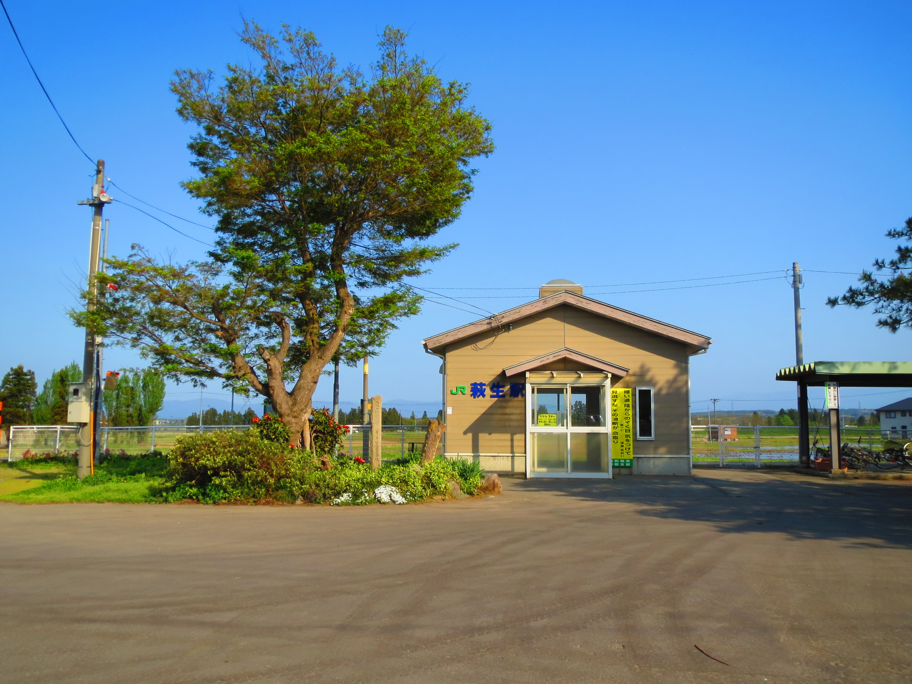 萩生駅（山形県西置賜郡飯豊町）